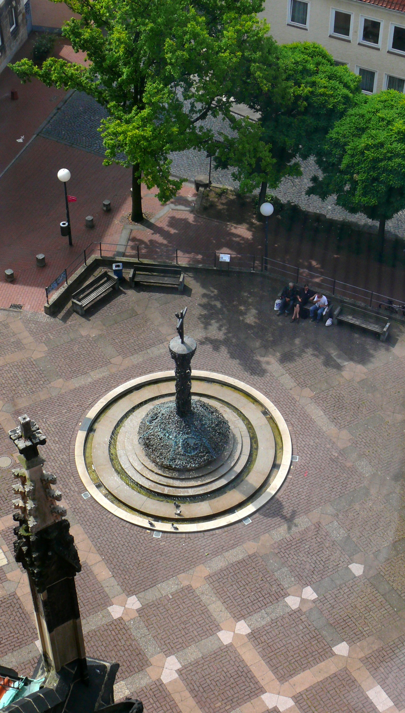 Bugenhagenbrunnen auf dem Platz vor der Andreaskirche in Hildesheim vom Kirchturm der Andreaskirche aus fotografiert